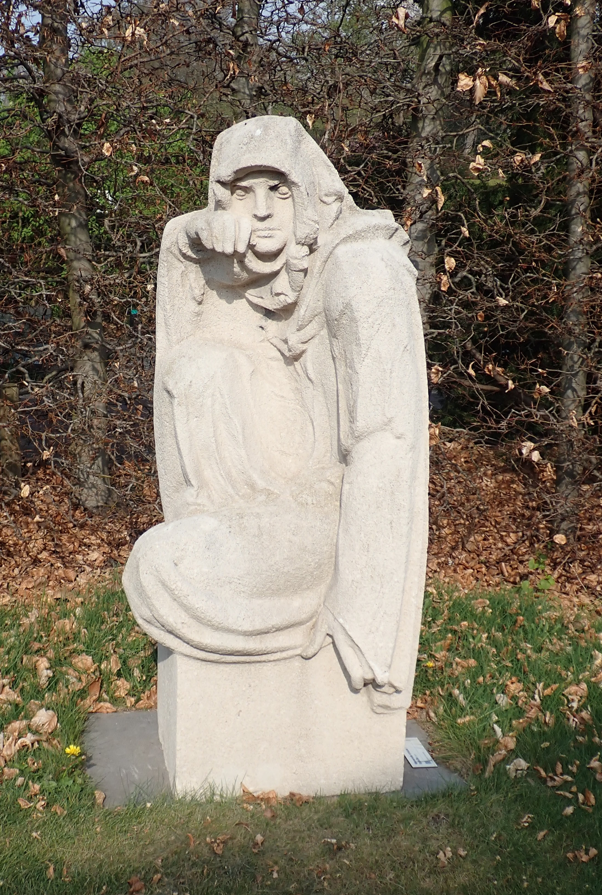 Voorburg-Leidschendam, Rodelaan. Kunstwerk "Wenende vrouw, Sybille" van Albert Termote. The Netherlands. FOP.